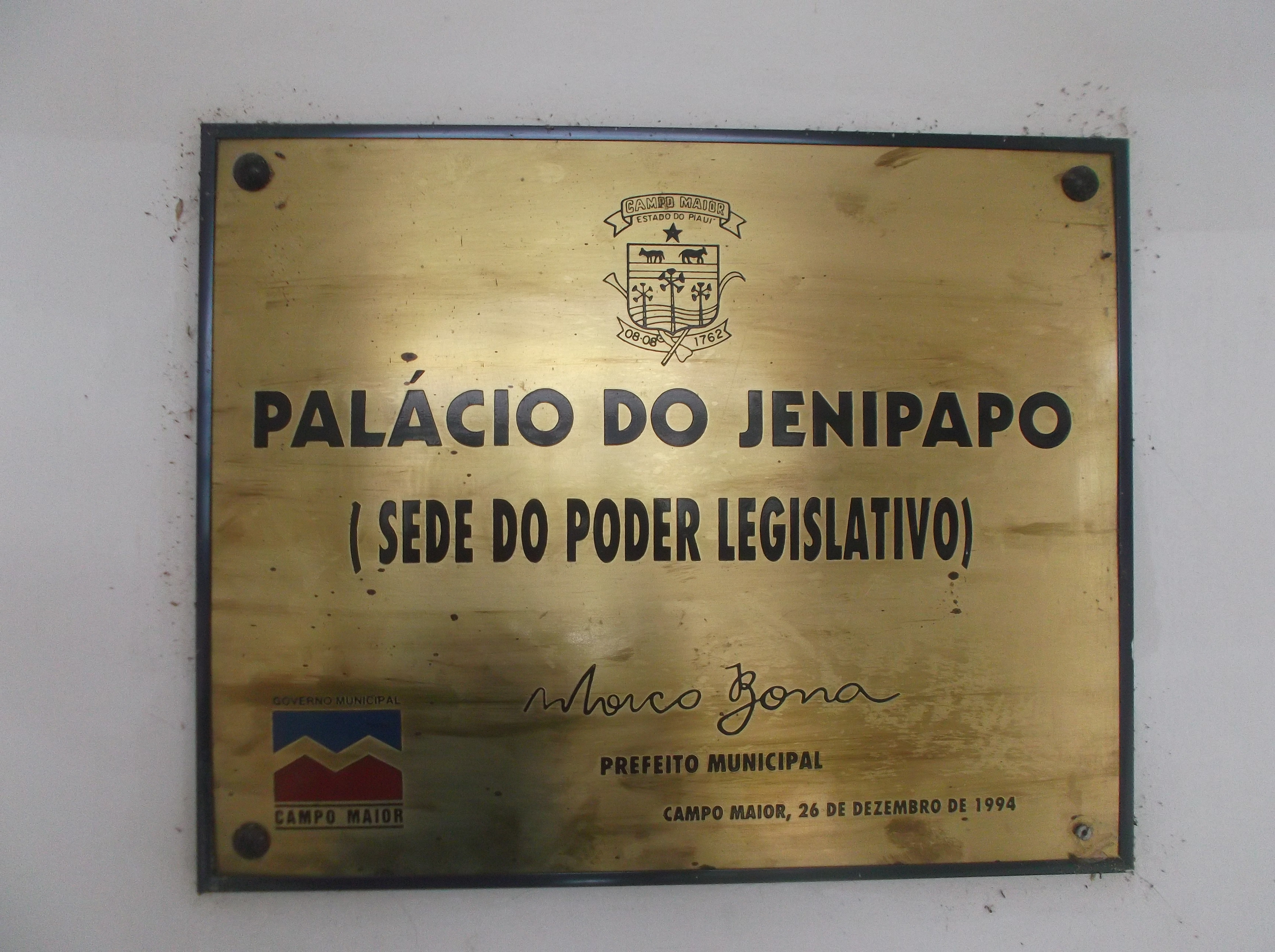 Placa de inauguração da reforma do Palácio do Jenipapo, sede do legislativo de Campo Maior-Piauí.